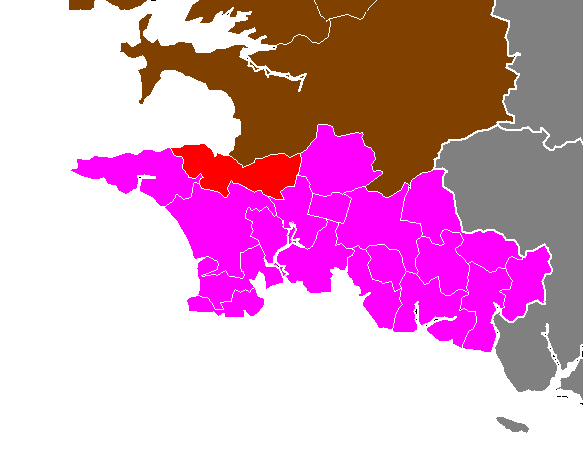 Maps of arrondissements and cantons of France: Arrondissement de Quimper - Canton de Douarnenez.PNG (Département du Finistère , Arrondissement de Quimper)